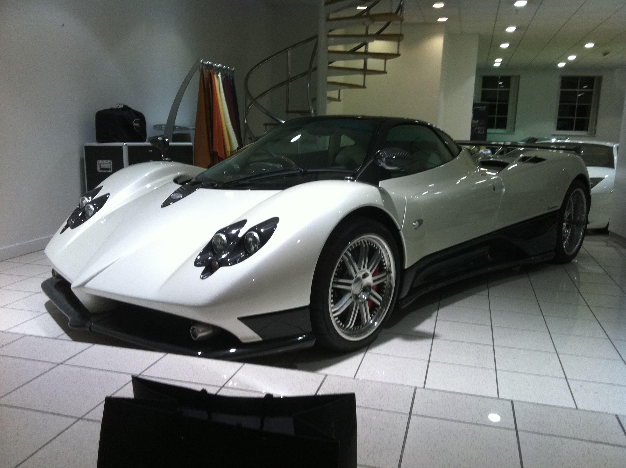 Pagani Zonda, Park Lane, London